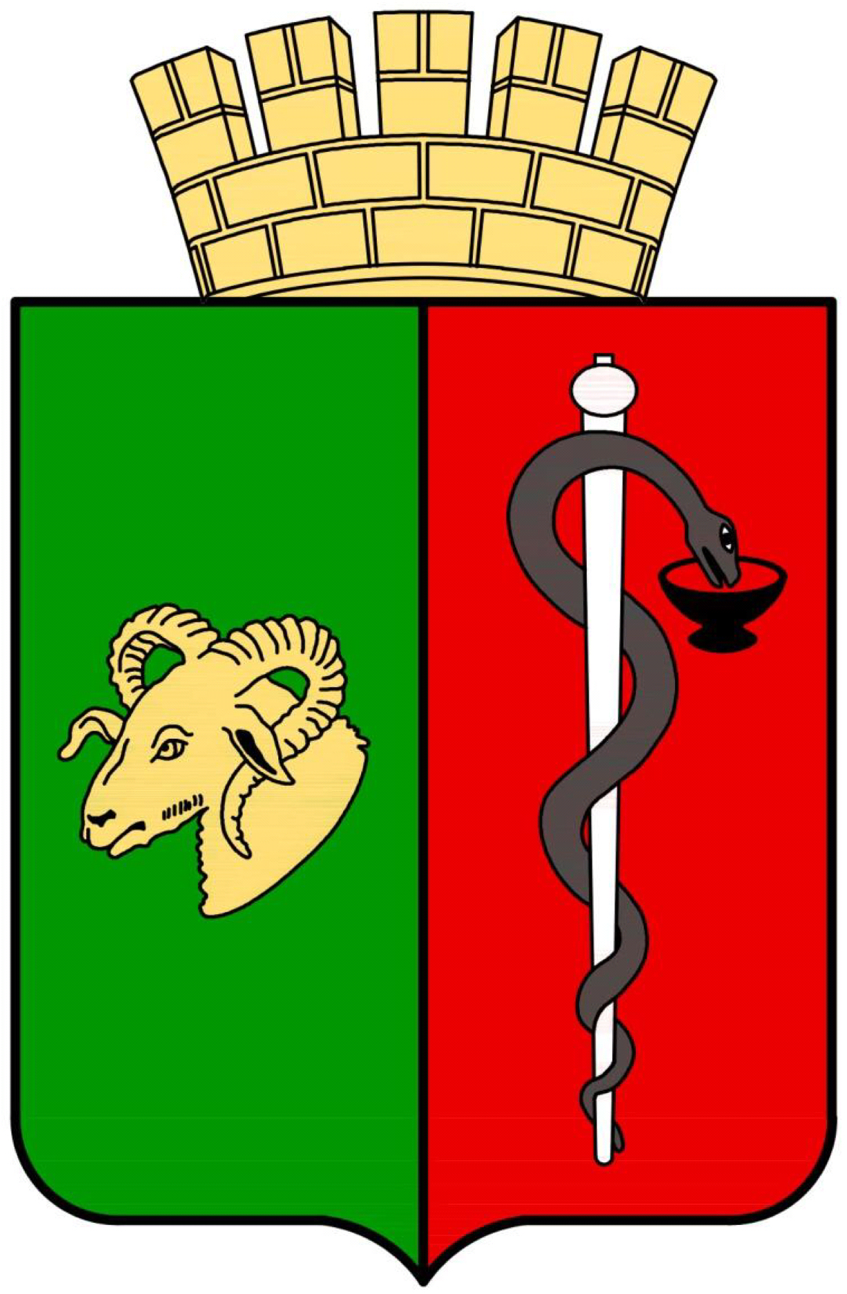 Большой герб города Евпатория